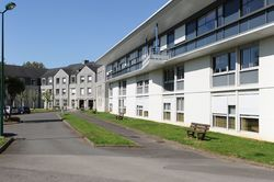 résidence de Kervénoël du Centre Hospitalier du Centre Bretagne à Pontivy